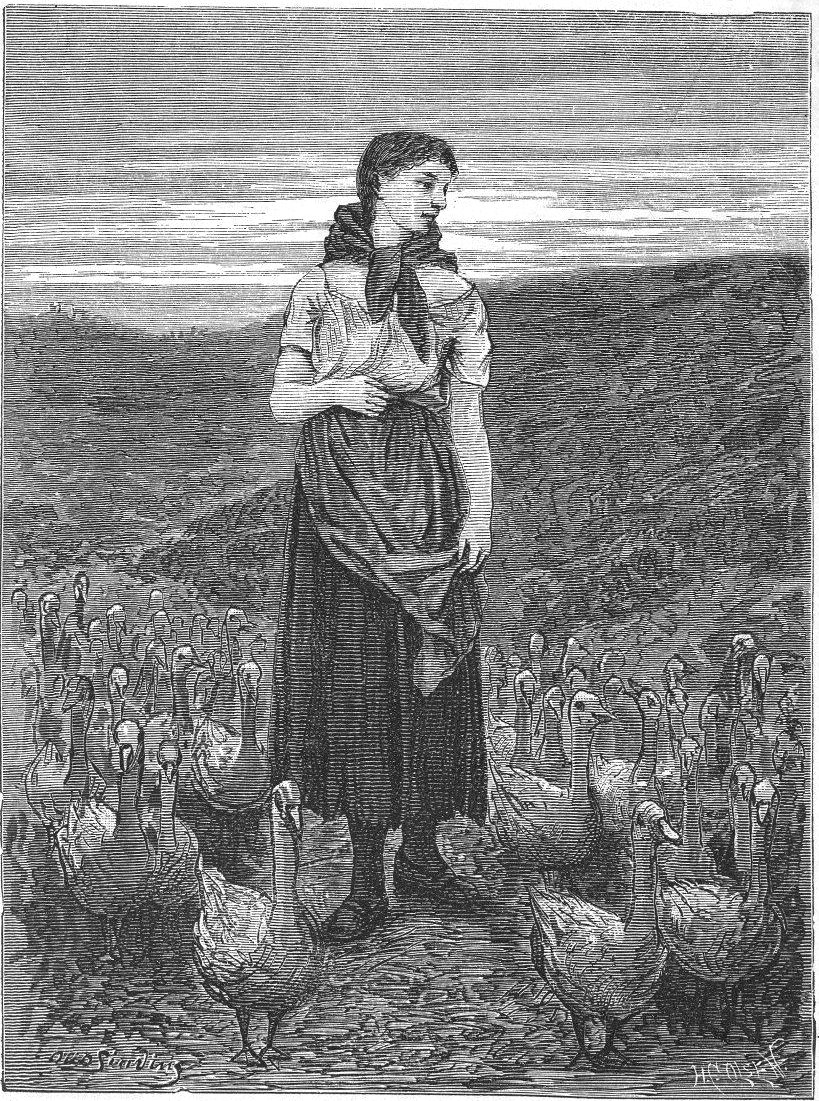 Illustration for the Norwegian fairy tale "Vesle Aase Gaasepige" in Norske folke- og huldre-eventyr from 1879